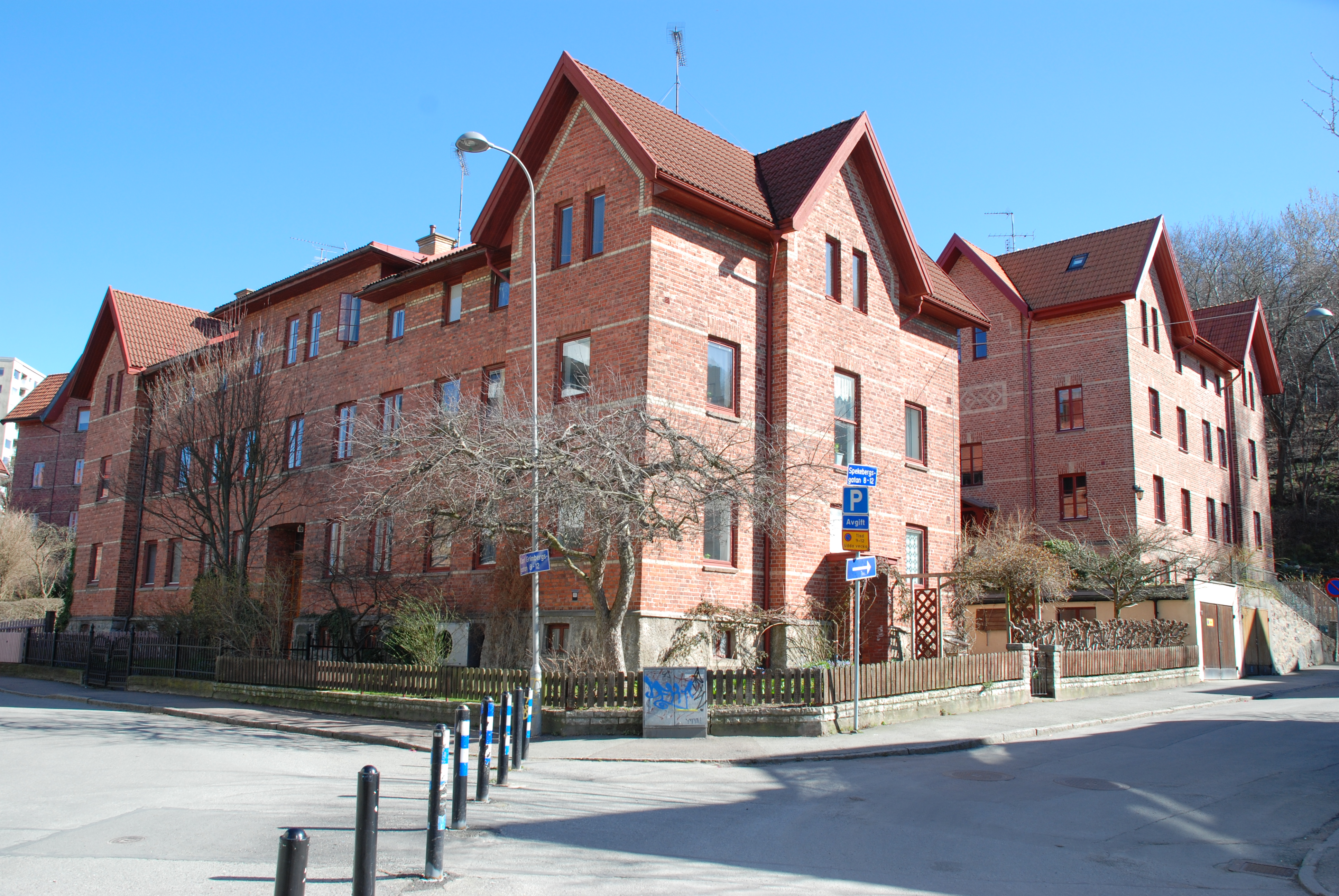 Carl Grimbergsgatan 8-12/Spekebergsgatan 8-12 i stadsdelen Annedal i Göteborg.